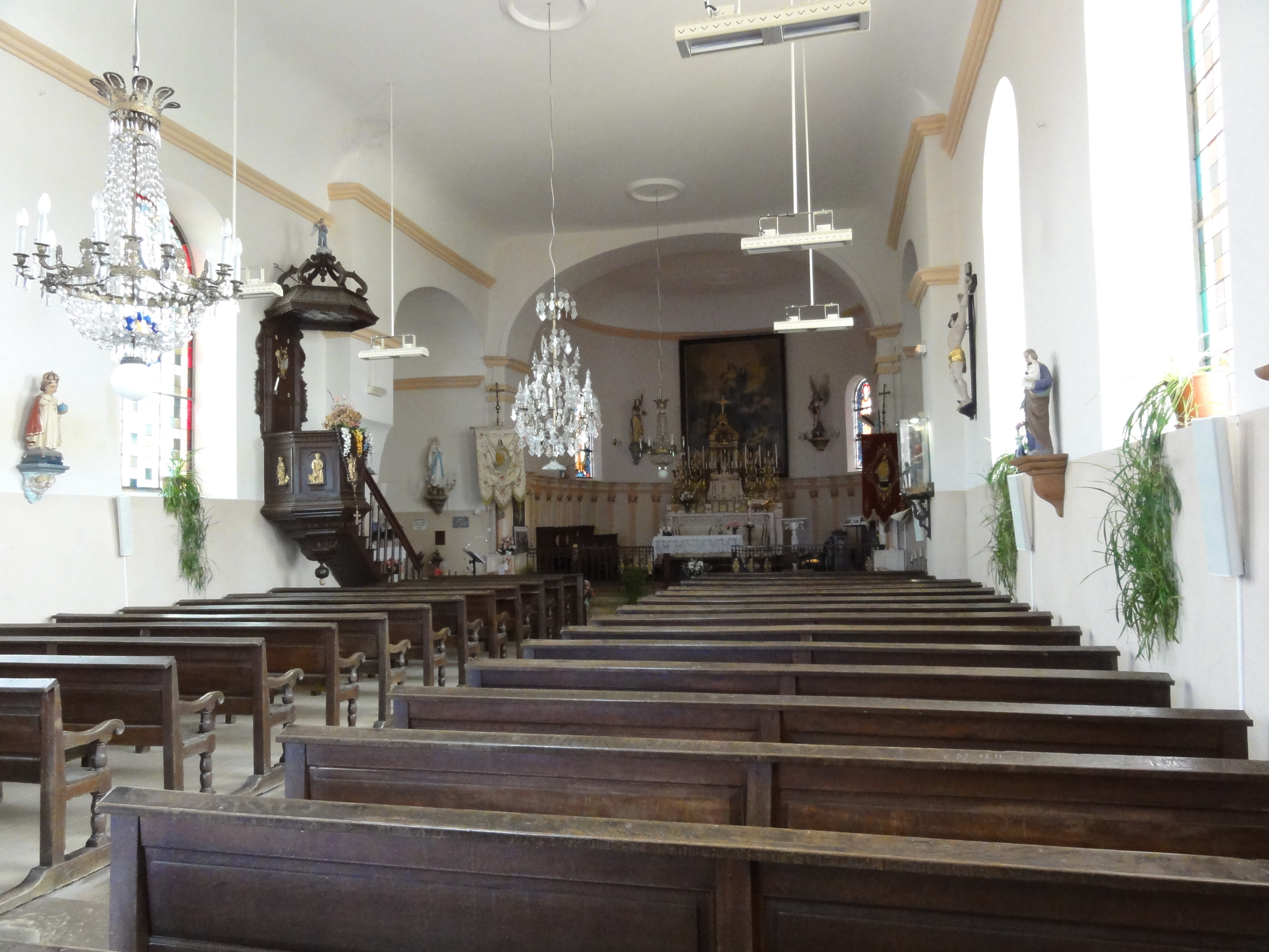 Rhodes (Moselle) église intérieur